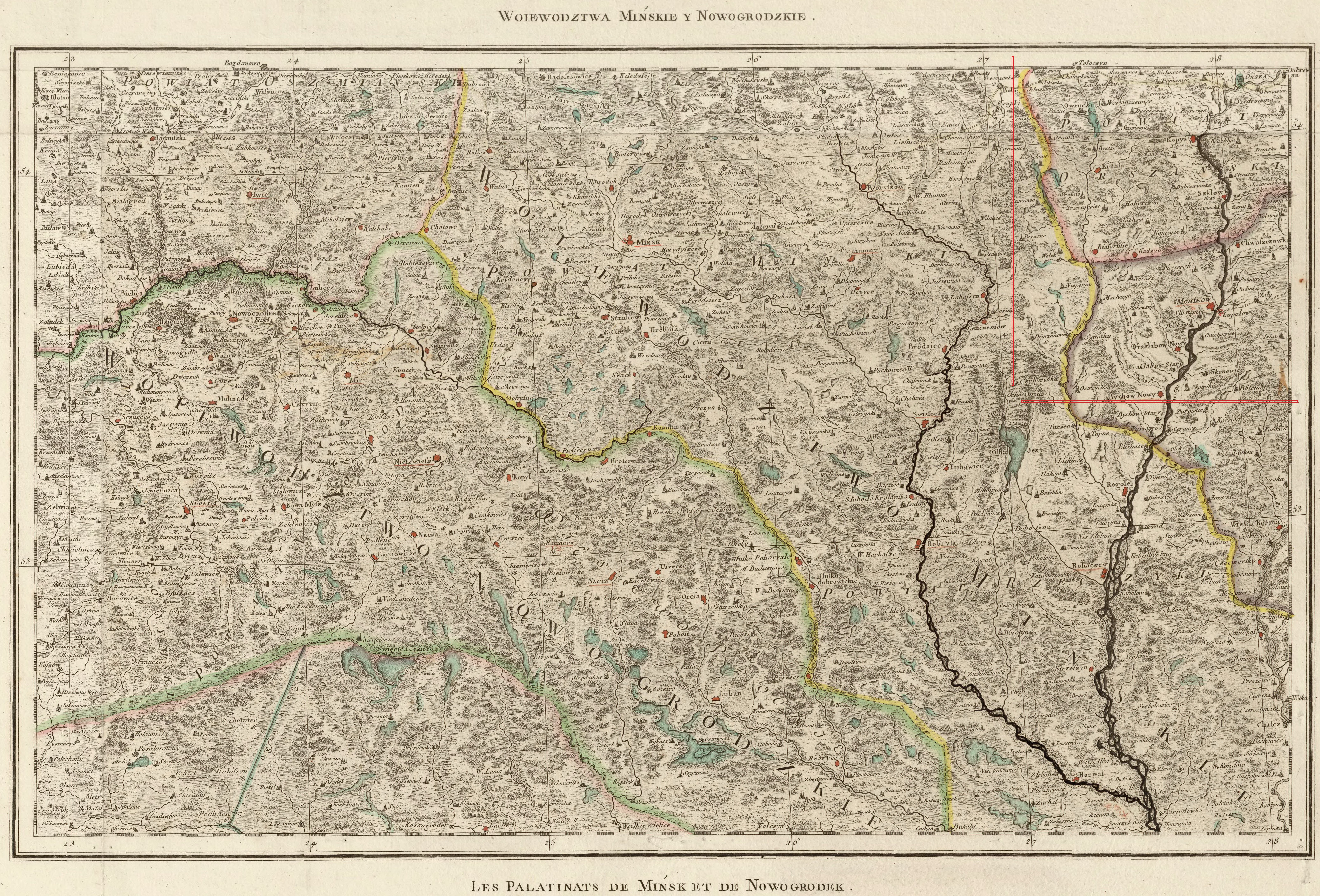 Карта Zanonni - Pologne Nowogrodzkie